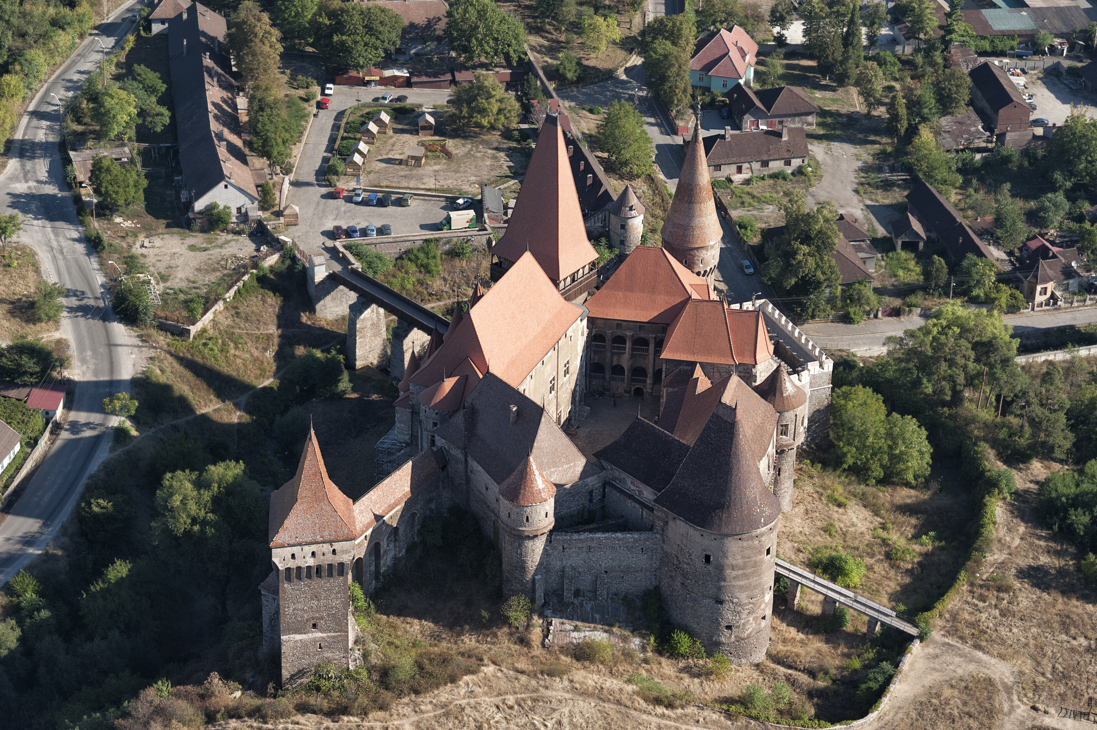 Castelul Corvinilor din Hunedoara